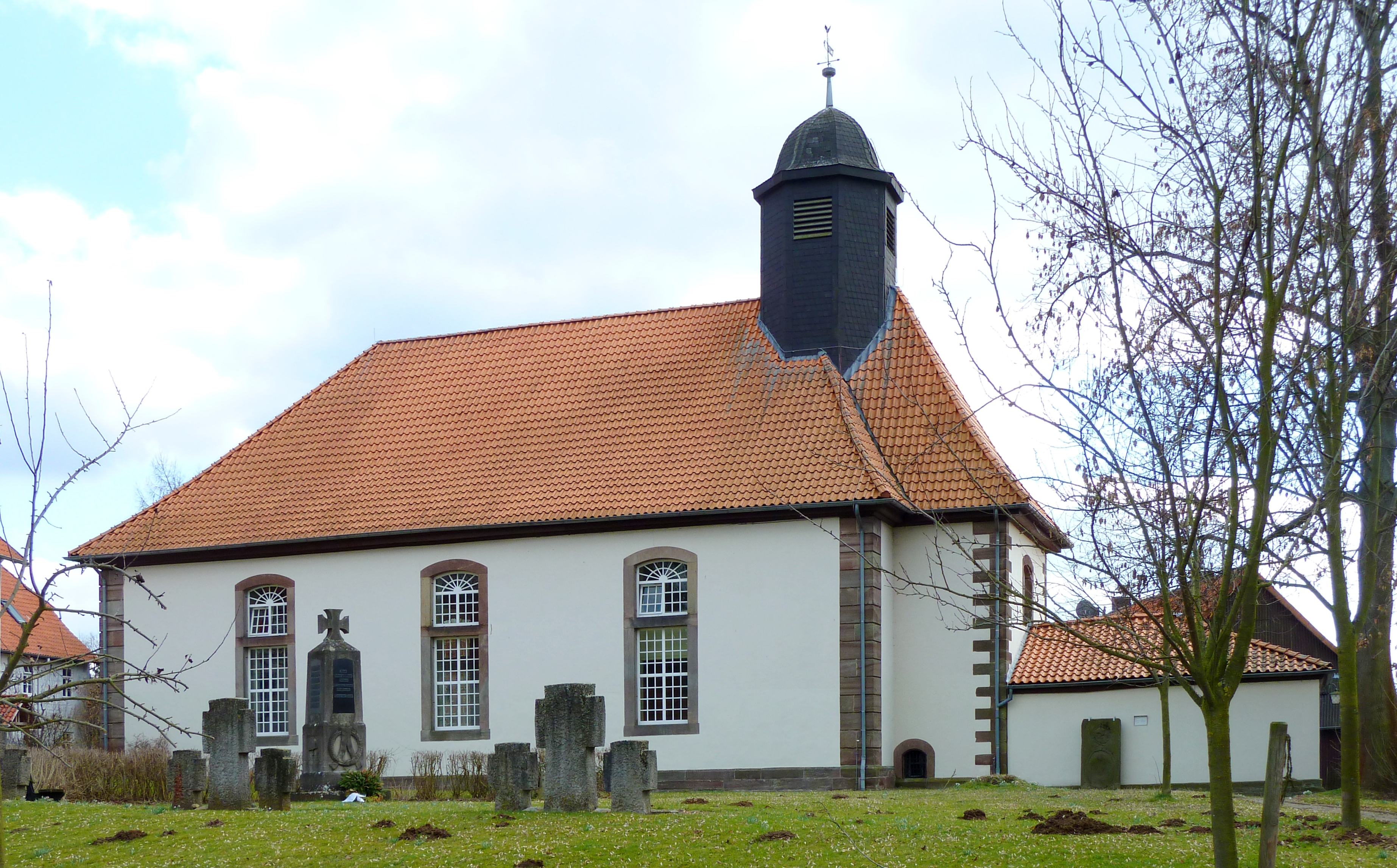 Ev.-luth. Kirche St. Johannis in Großenrode, Stadt Moringen, Niedersachsen. Eingeweiht 1740 unter Einbeziehung der 1730 errichtteten Familiengruft der Herren von Hardenberg